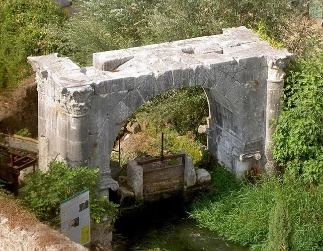 Arco trionfale di marcantonio ad Aquino